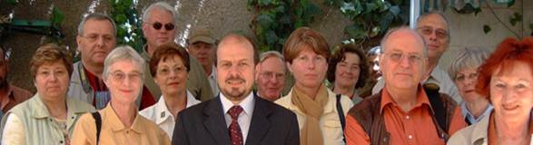 حوارات في إخاء الأديان